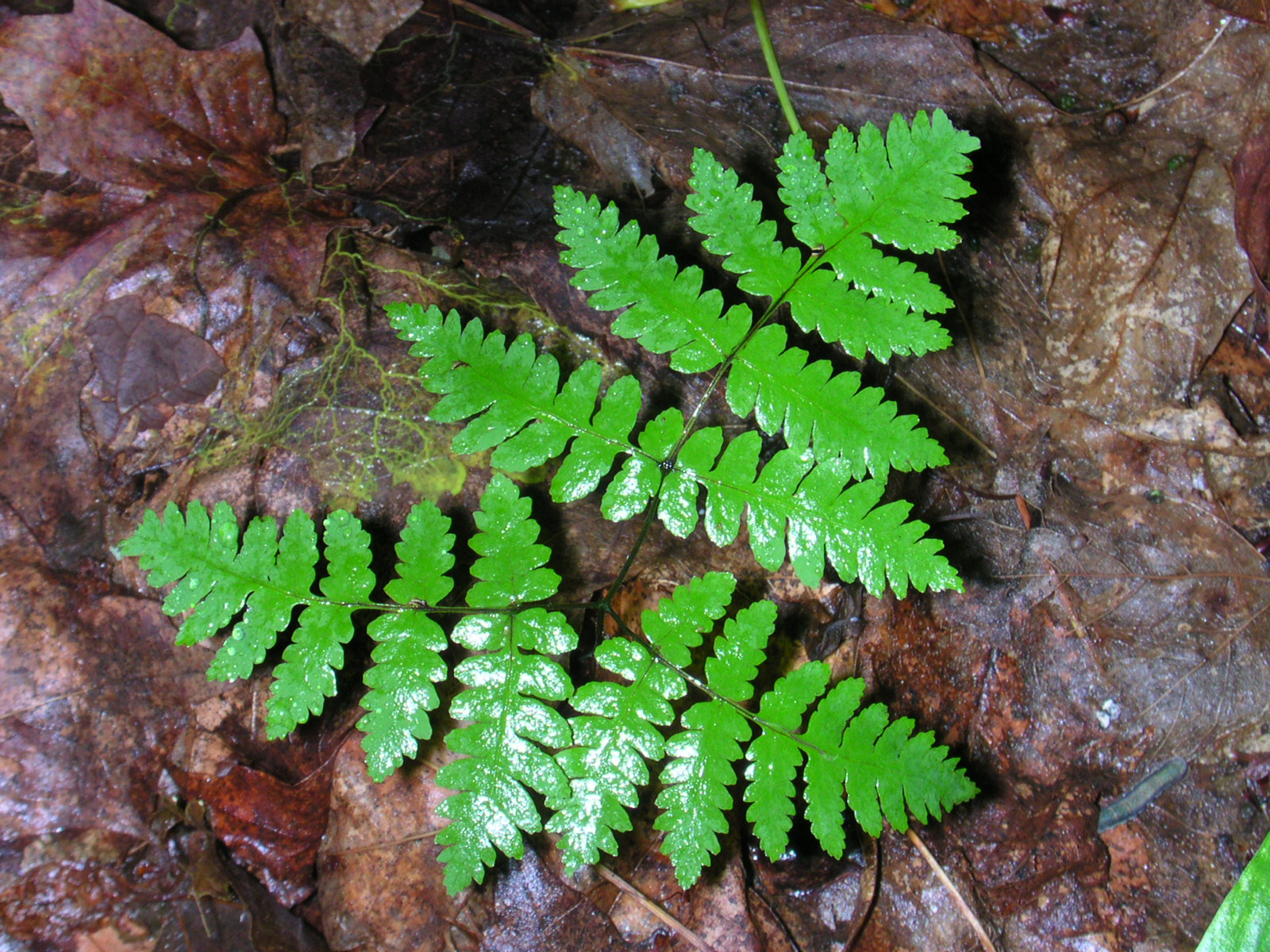 Gymnocarpium dryopteris 1-jgreenlee